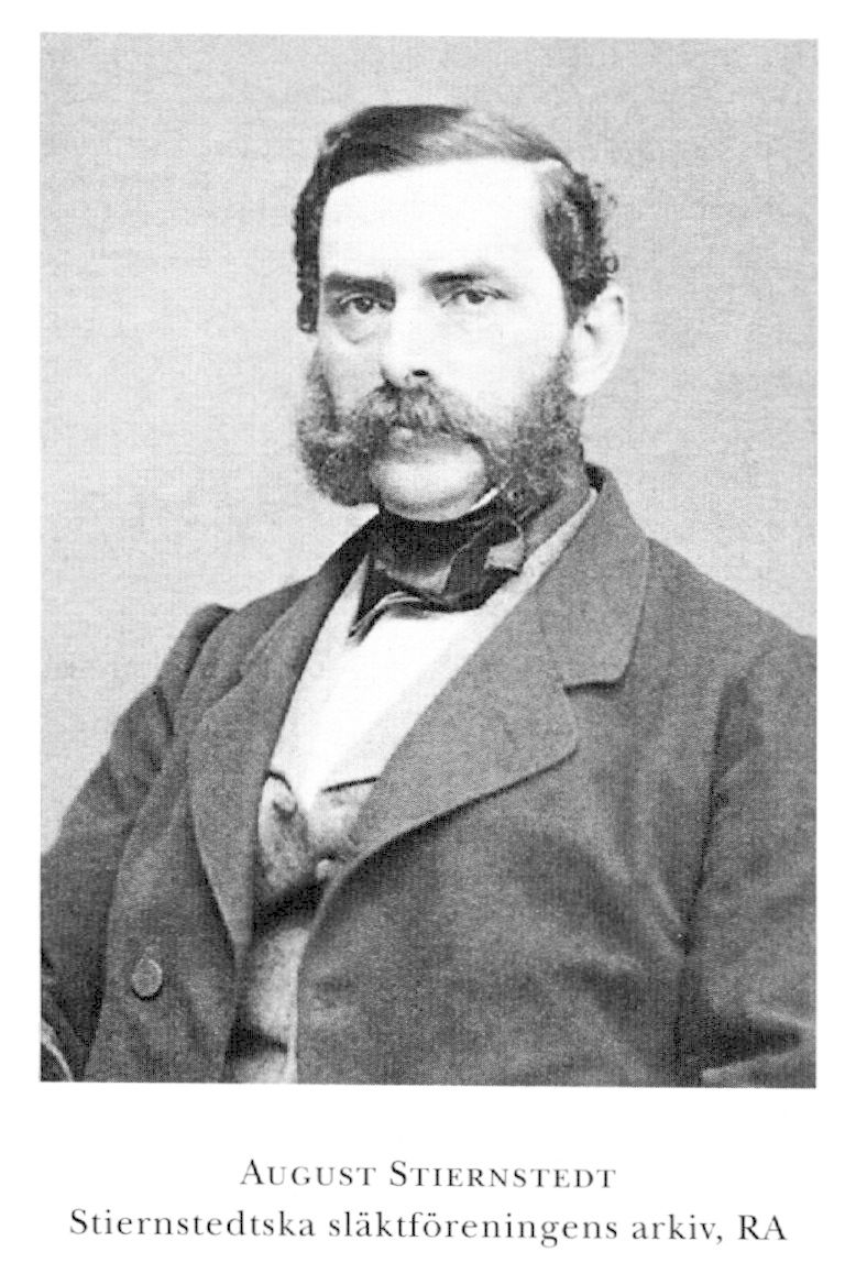 August W Stiernstedt, 1812-1880, svensk numismatieker